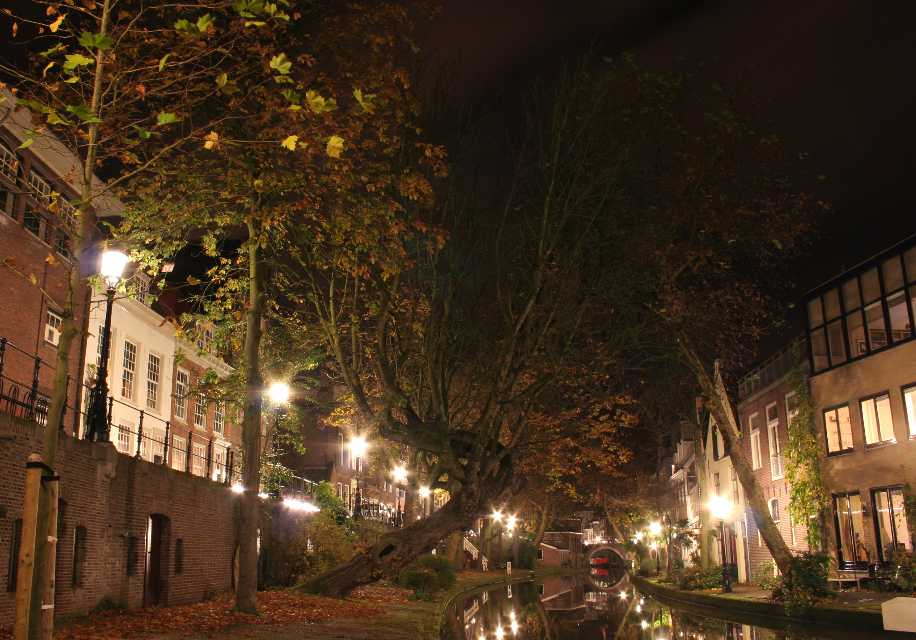 Oudegracht, Utrecht by night